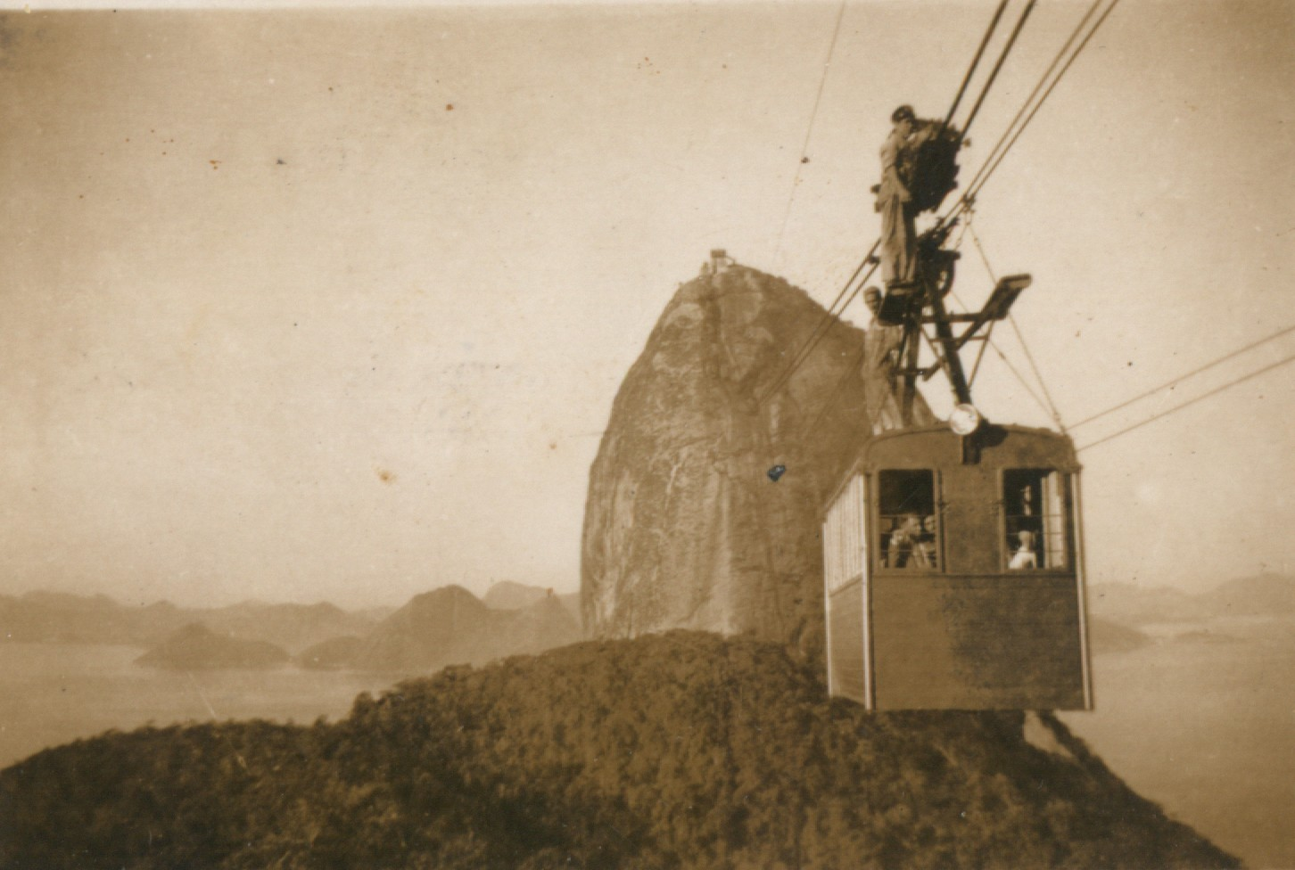 Rio de Janeiro - Brasil - 1940-50. Fotografia de meu pai, retratando a manutenção do Bondinho do Pão de Açúcar.